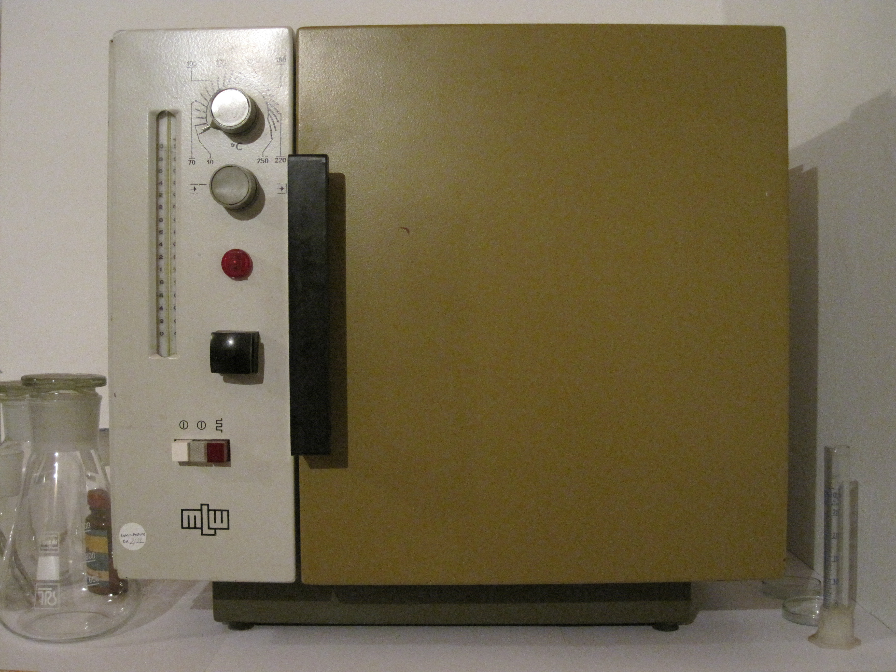 Wärmeschrank WS 30/31, Hersteller: VEB MLW Labortechnik Ilmenau